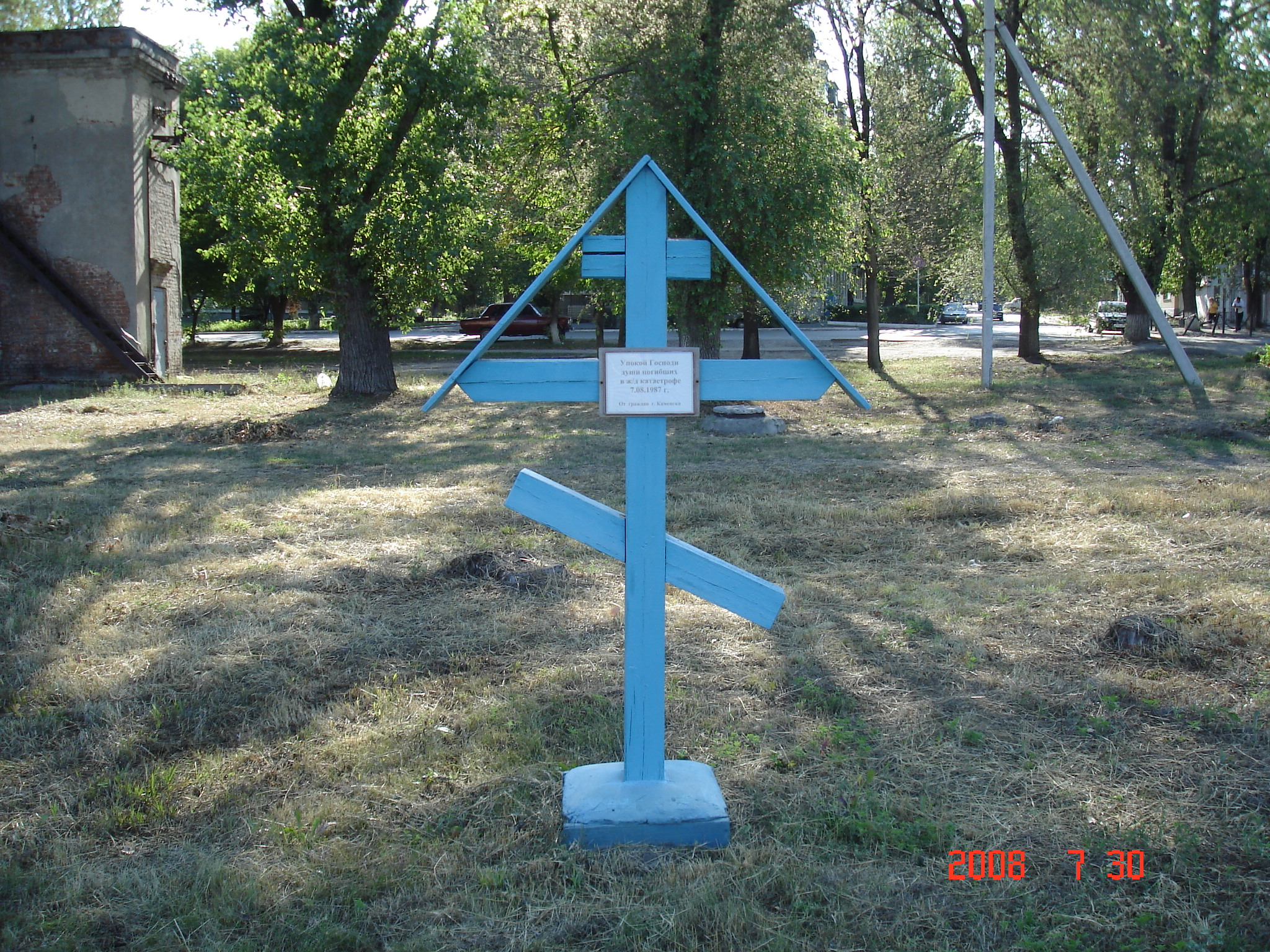 Памятник жертвам ЖД-катастрофы, Каменск-Шахтинский